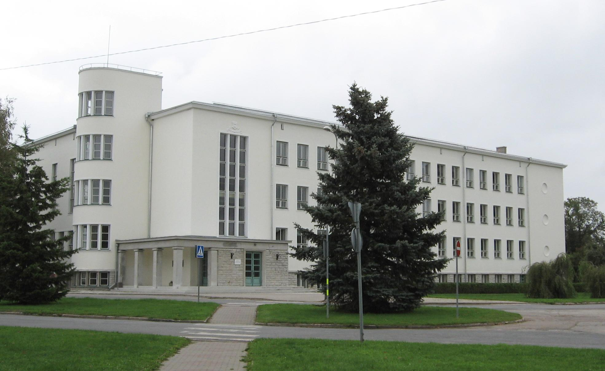 Rakvere ühisgümnaasiumi hoone